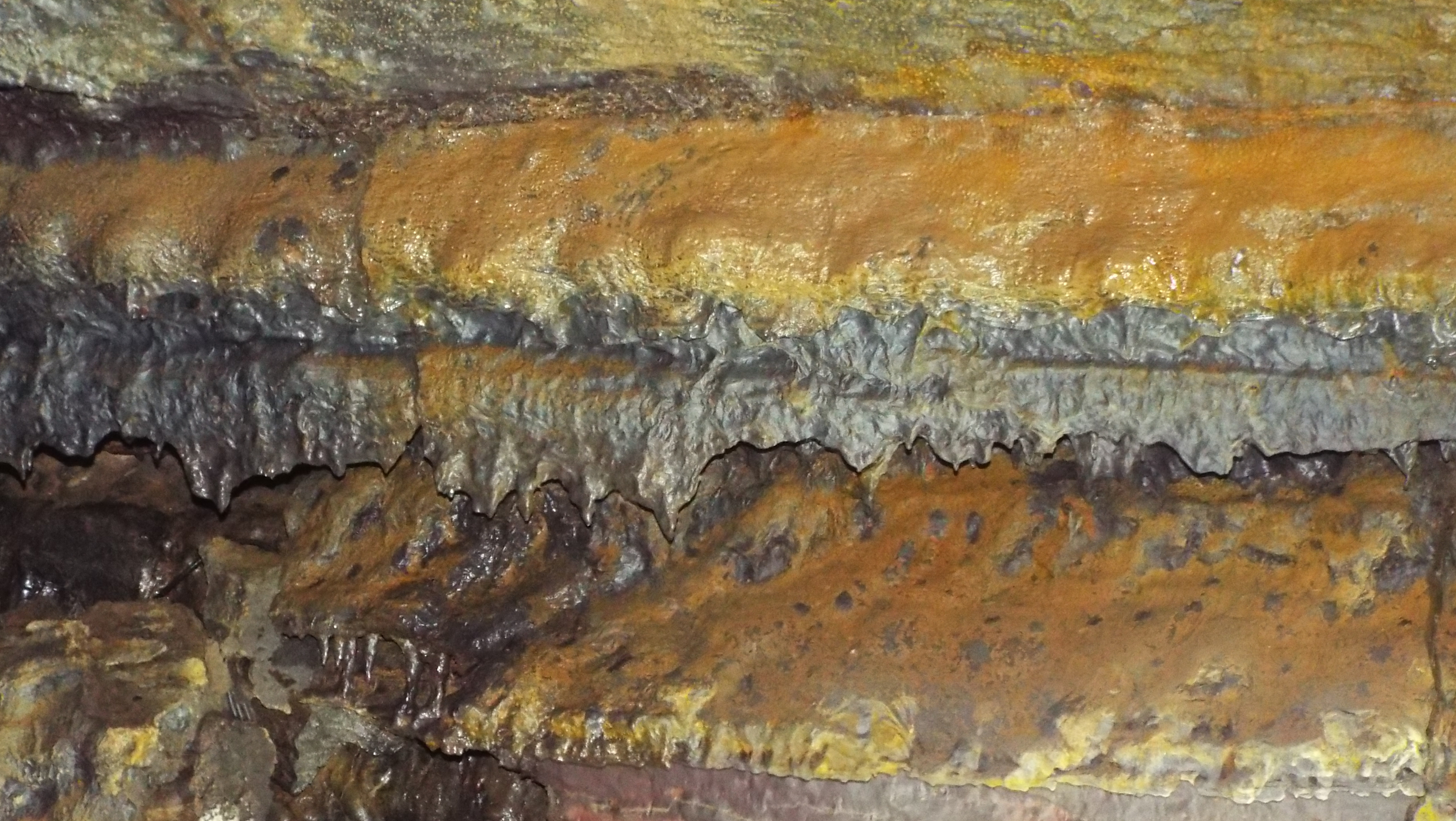 An den Decken und Wänden bildeten sich viele Stalaktiten, sie haben in der Regel eine konische Form und glatte Oberflächen, die das Ergebnis der Verfestigung von Lavartröpfchen sind oder es bildeten sich unregelmäßige Formen, oft weiß-/gelblich und äußerst zerbrechlich.